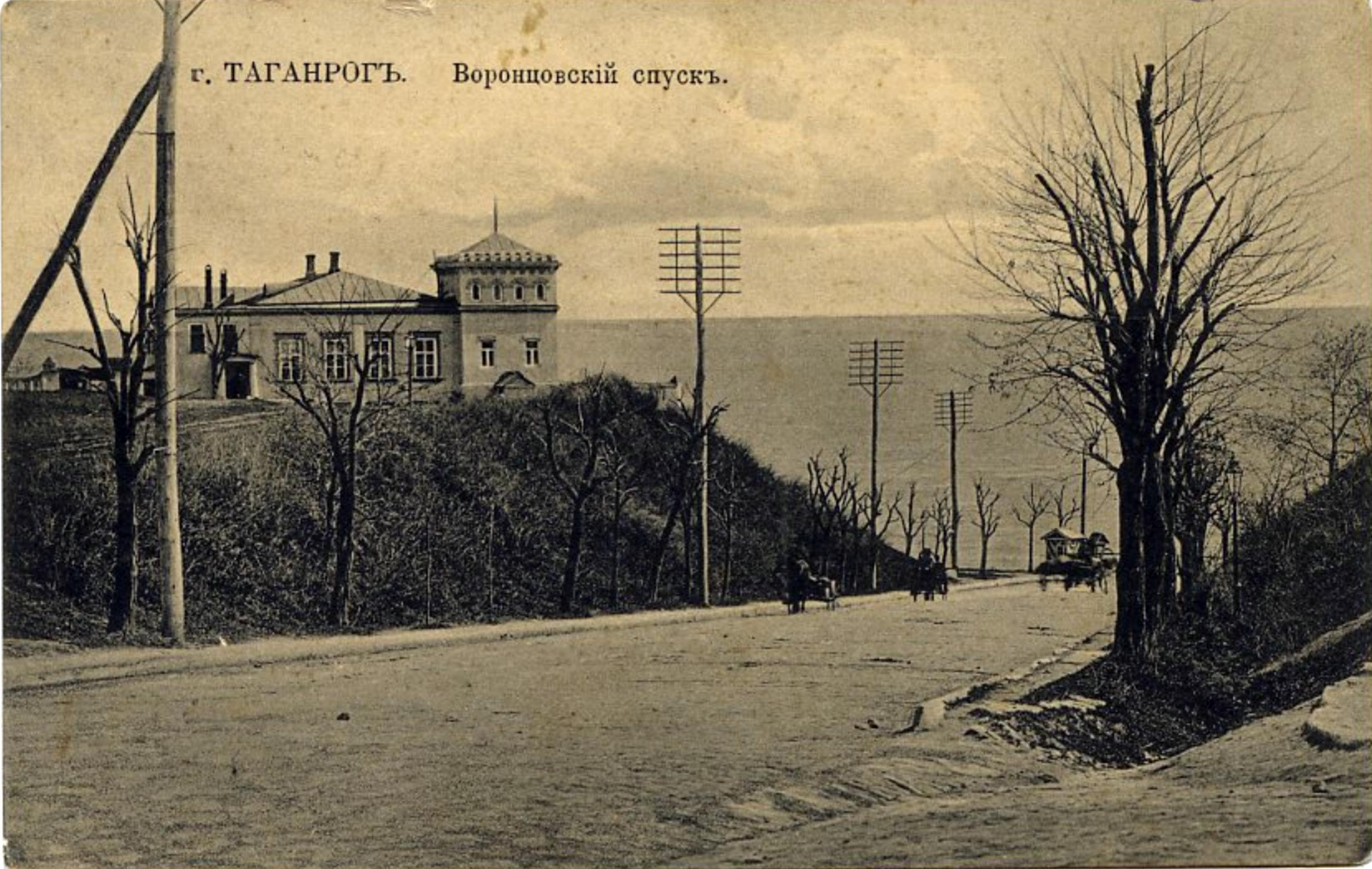 Воронцовский спуск, Таганрог. Открытка издания К. В. Василевского 646/25